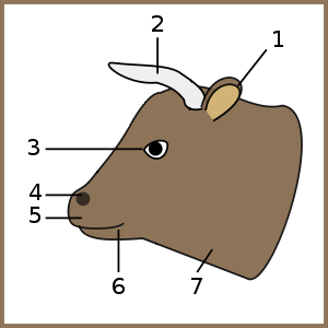 Српски (ћирилица): Ја нисам аутор те фотографије, али сам је скинуо са Викимедије и дорадио. Наиме, иста верзија главе краве је постојала, али са више бројева.